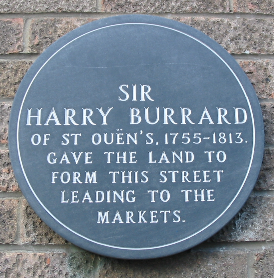 Nrf: Saint Hélyi, Jèrri